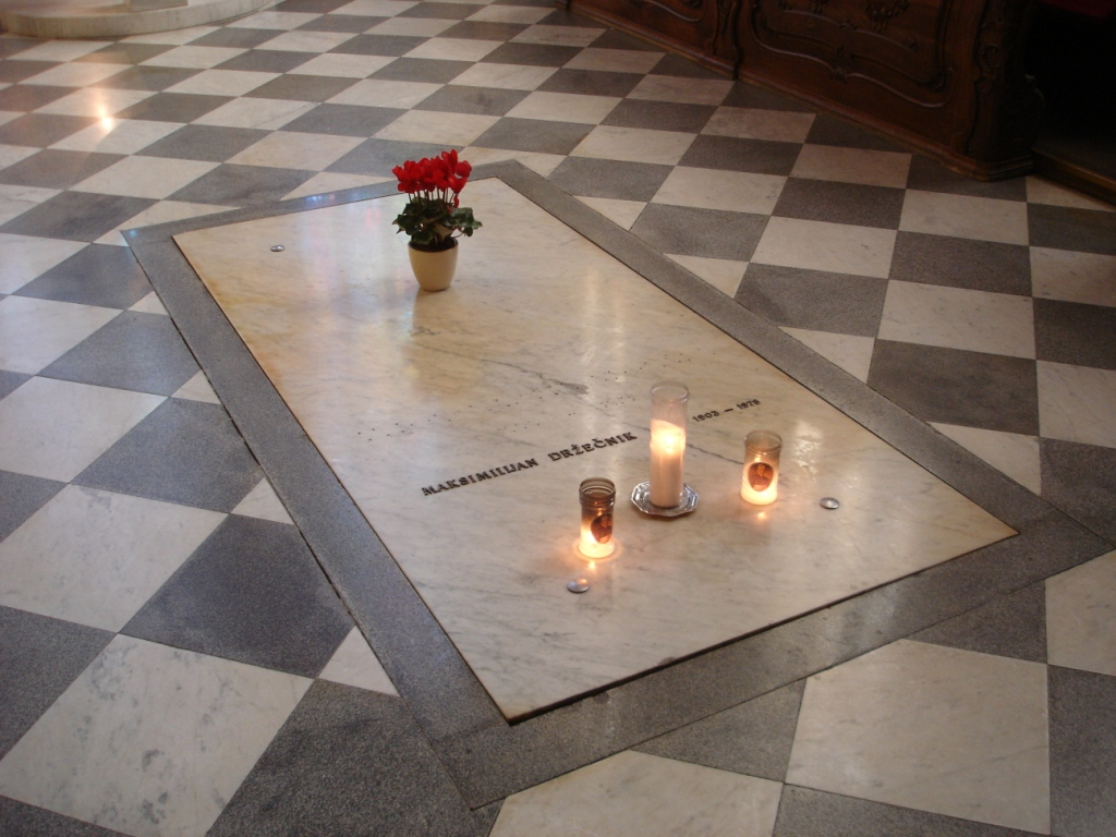 Vault of bishop Maksimilijan Držežnik, Cathedral of Maribor, Slovenia